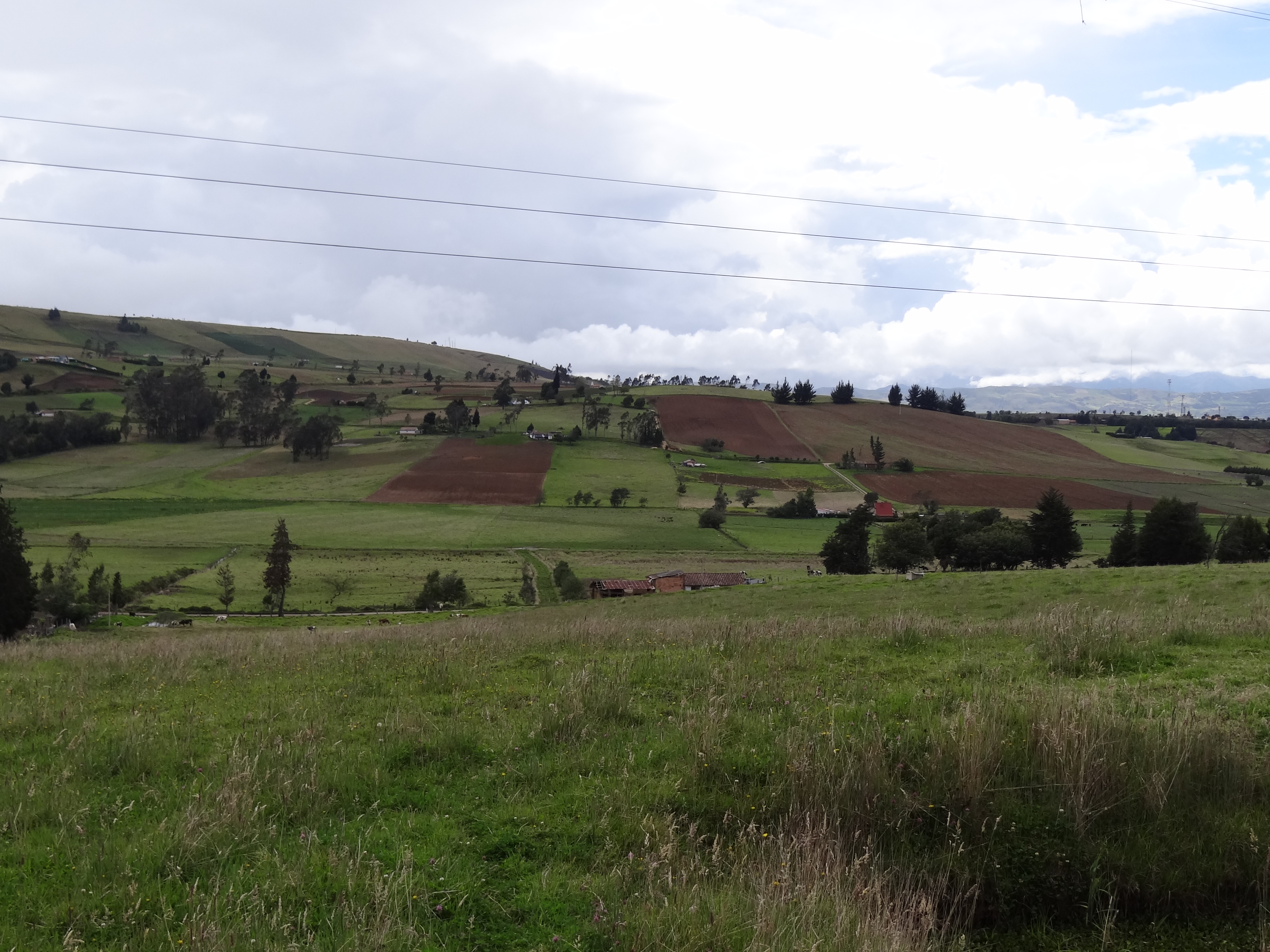 Áreas de cultivos en el municipio de Soracá, departamento de Boyacá, Colombia.